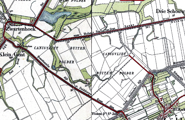 Canisvliet_buitenpolder